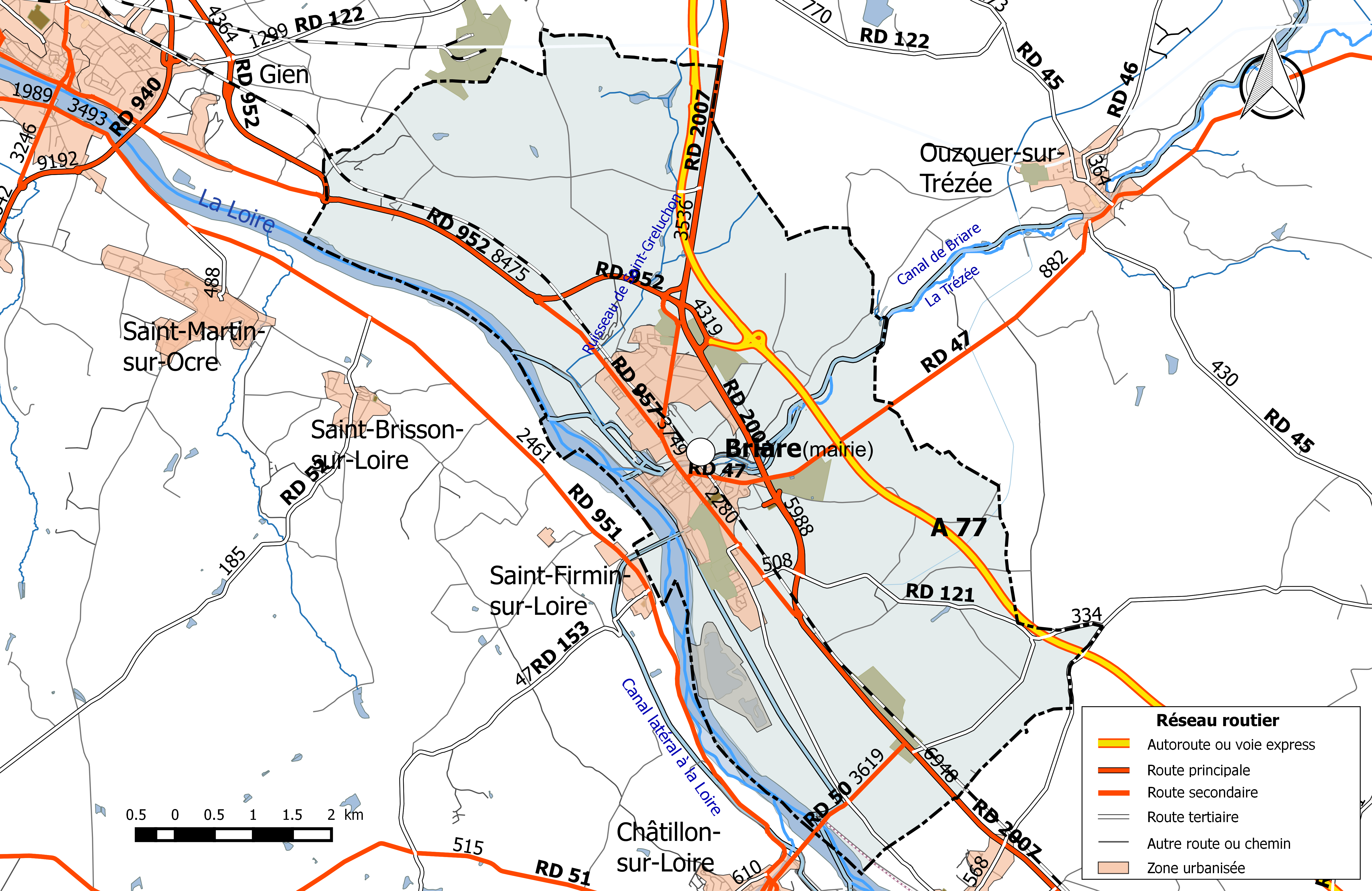 Carte du réseau routier de la commune de Briare.